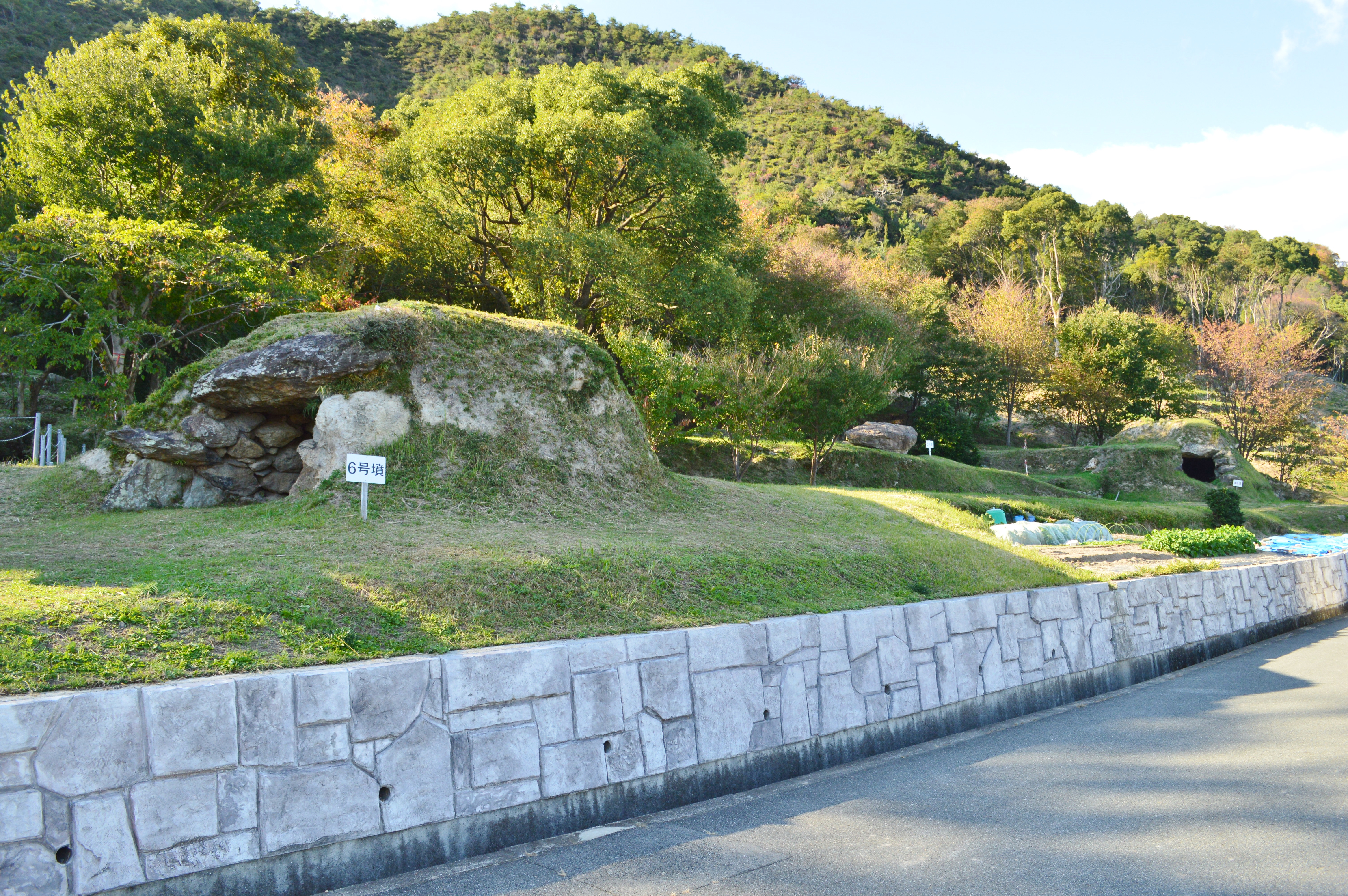 見野古墳群 概観